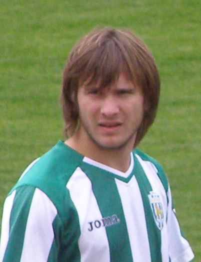 Jaroslaw Sworak - ukrainischer Fußballspieler